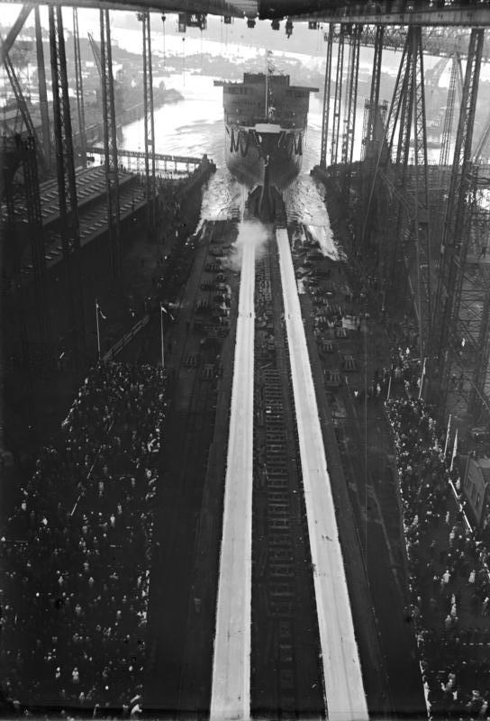 Der Stapellauf des größten Ozeandampfers "Europa" fand unter Teilnahme des amerikanischen Botschafters Shourmann und anderer hoher Persönlichkeiten auf der Werft von Blohm und Voss in Hamburg statt. Der Ozeandampfer "Europa" während des Stapellaufes, wird seinem Element übergeben.